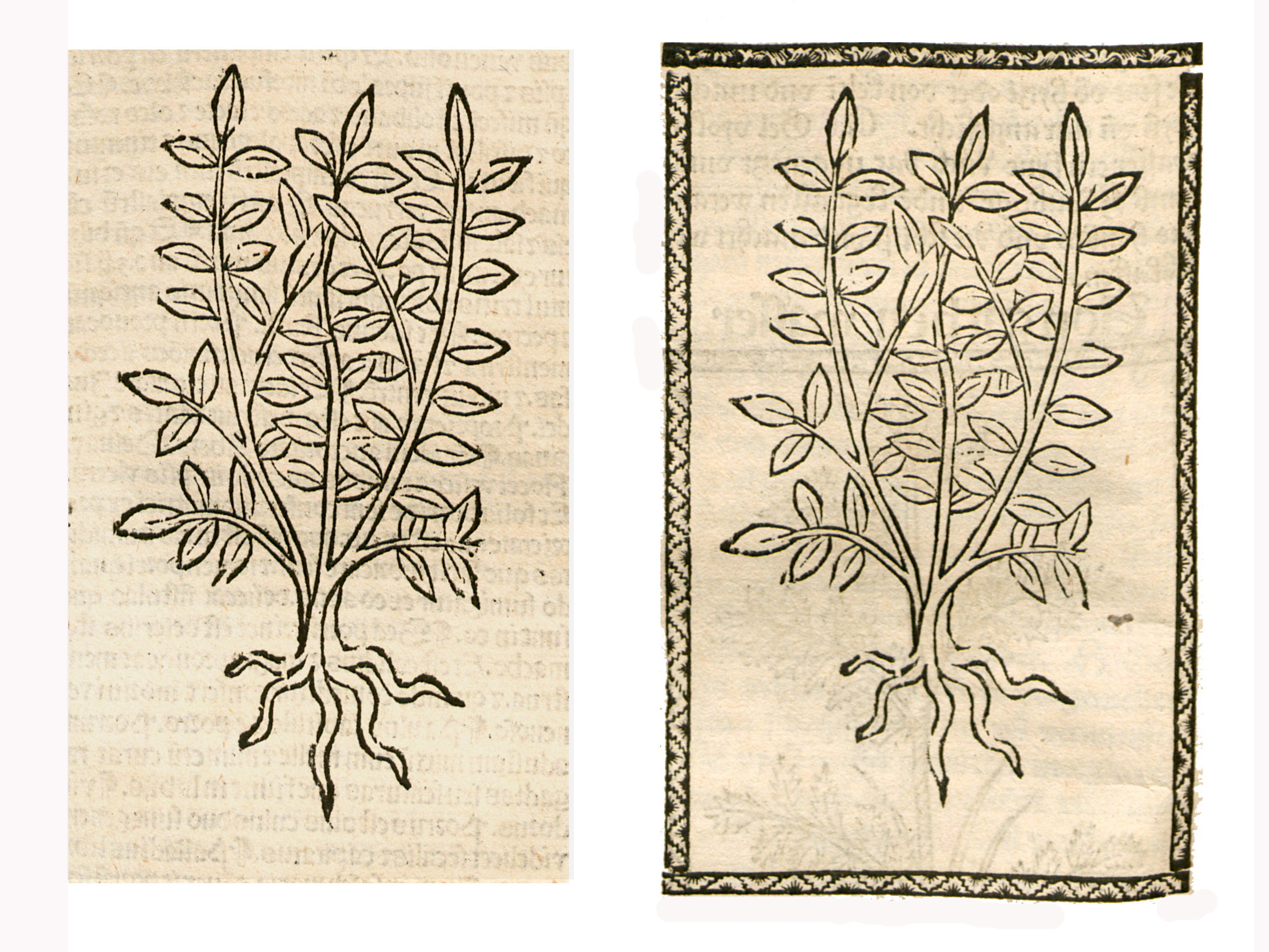 Abbildung zum Kapitel Garten Kreß (Lepidium sativum)